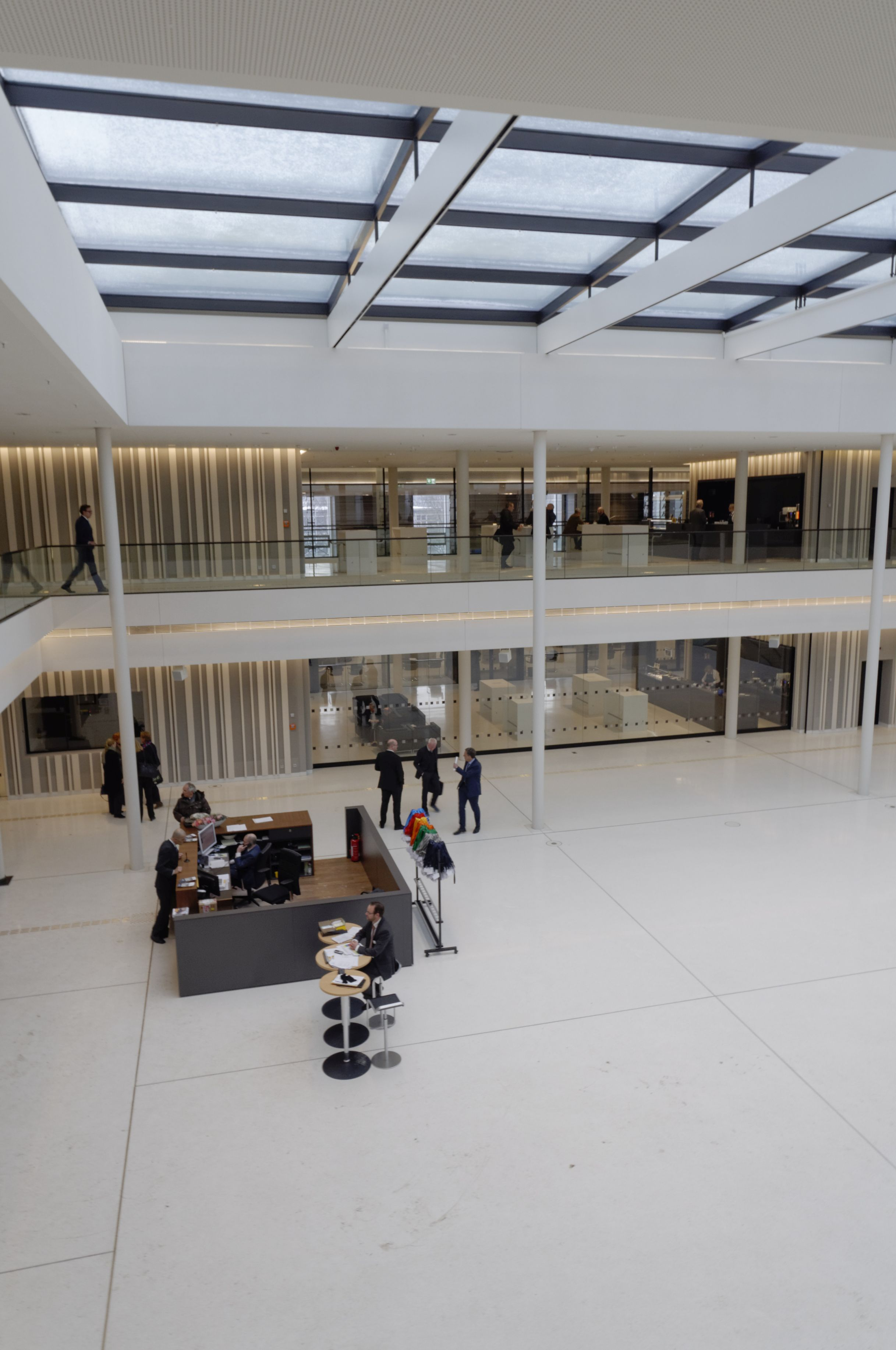 der neue Niedersächsischer Landtag 2018